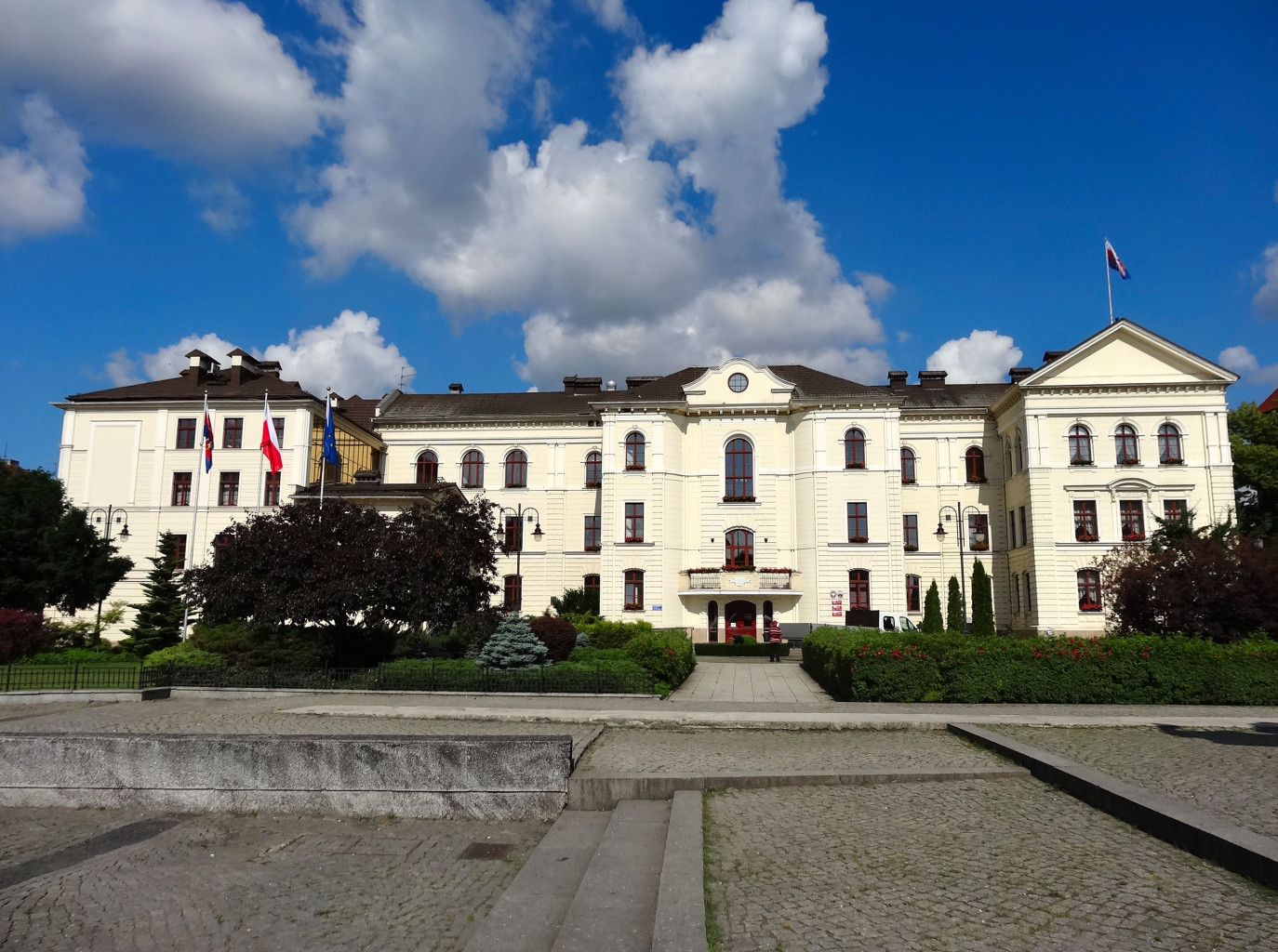 Ratusz w Bydgoszczy przy ul. Jezuickiej/Starym Rynku, dawne Kolegium Jezuickie (XVII w.)